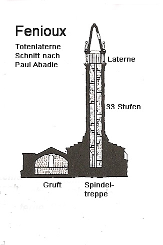 Fenioux, Totenlaterne, Schnitt